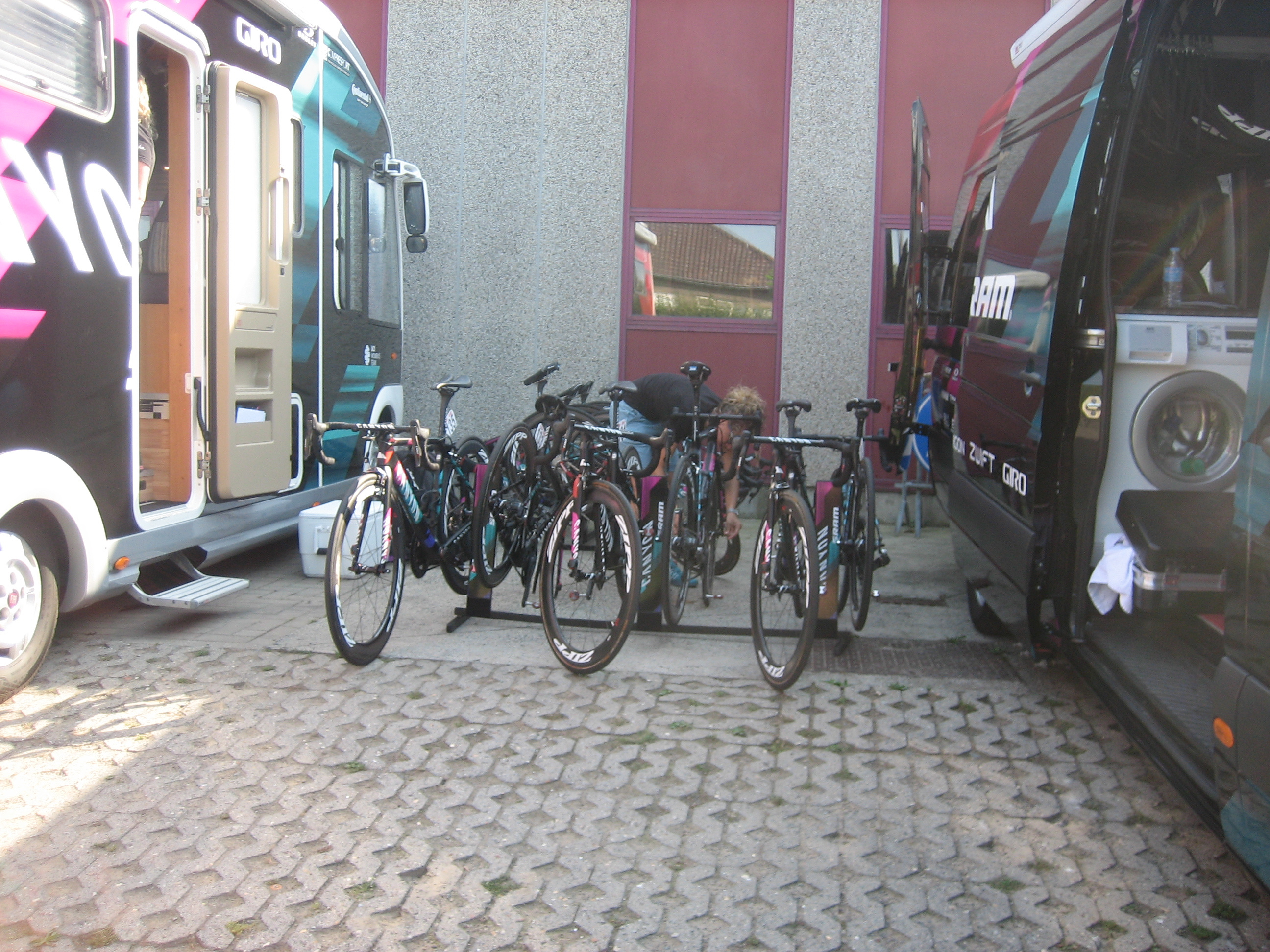 Na de finish van de 2e etappe van de Lotto Belgium Tour 2016 in Lierde.